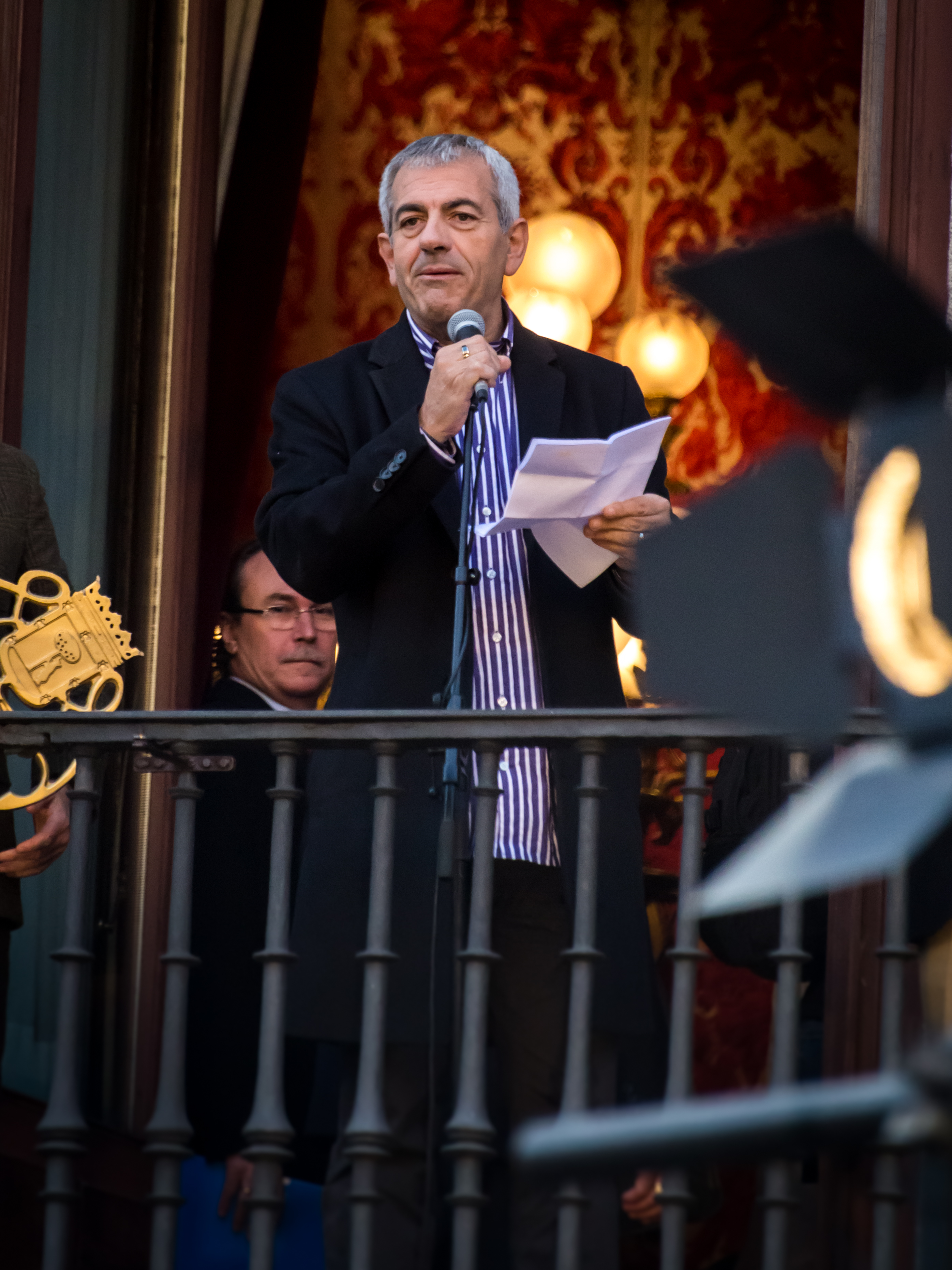 Carlos Sobera lee el pregón del carnaval y recibe las llaves de la ciudad en la Plaza de la Villa, Madrid.